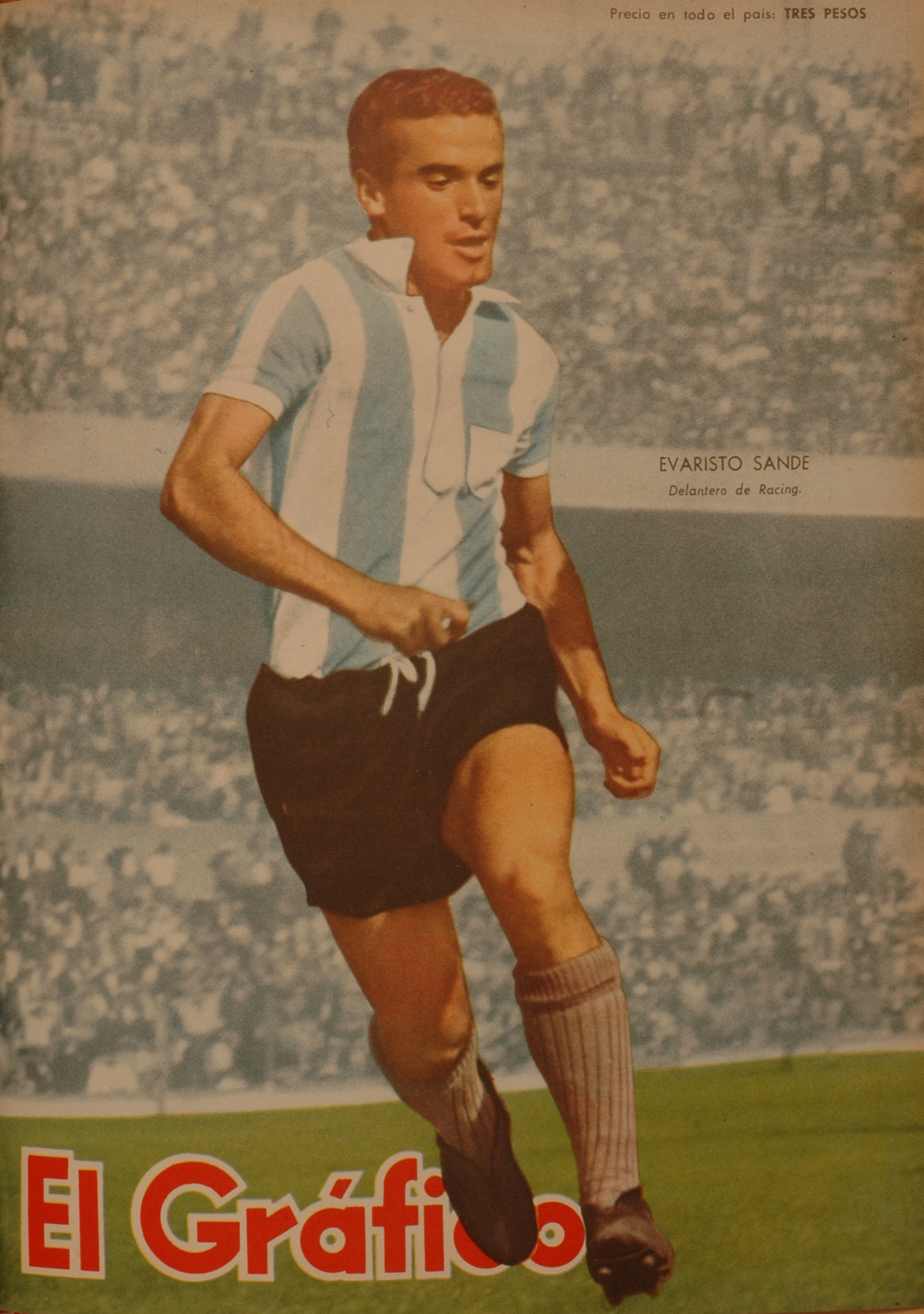 El Grafico del 11 de Julio de 1958. Edicion 2026